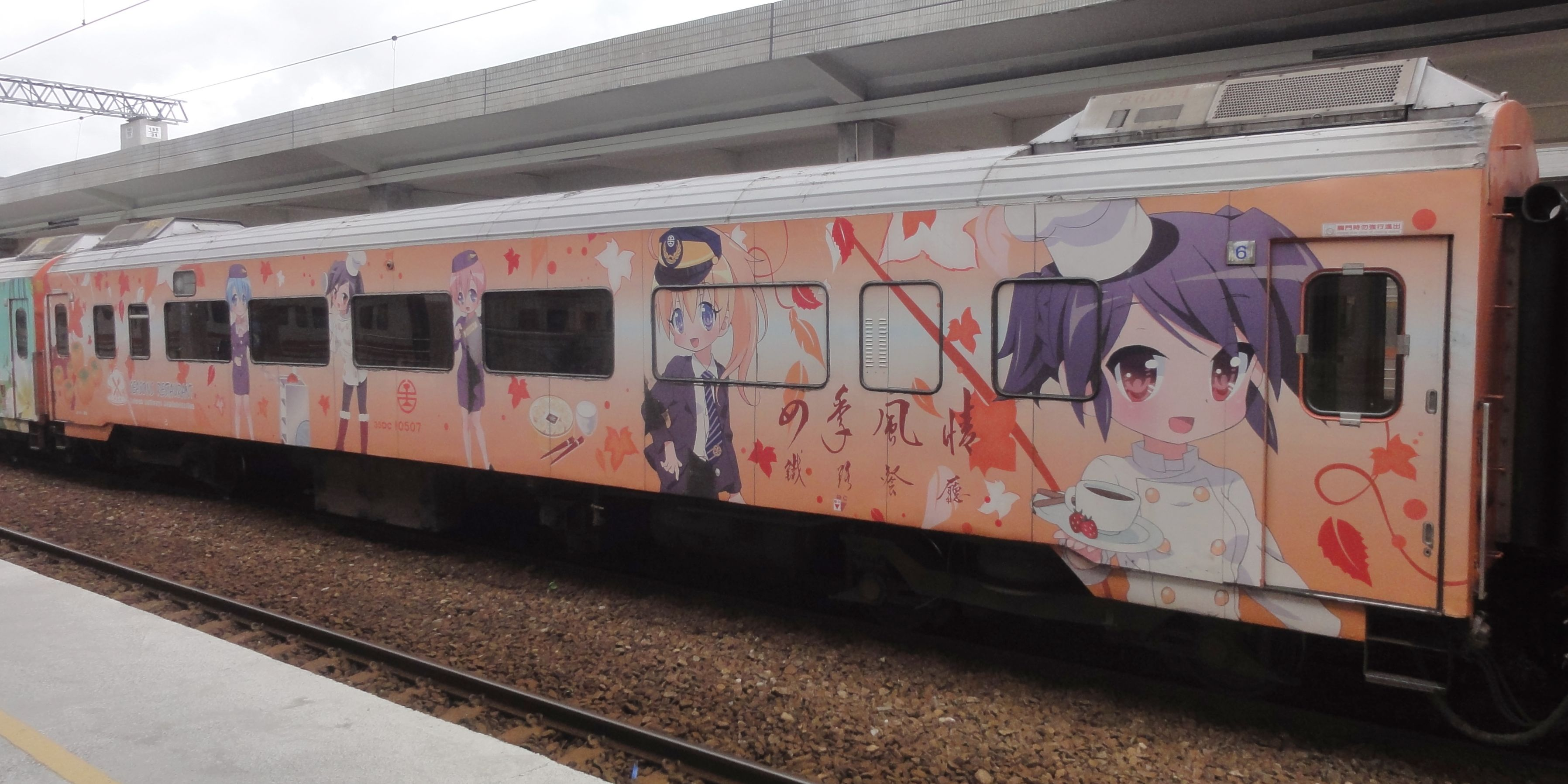 臺灣鐵路管理局莒光號餐車35DC10507，車身畫「四季風情鐵路餐廳」廣告。